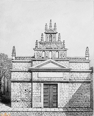 Fachada principal del desaparecido convento de San Pablo de Burgos, de la Orden de los dominicos.